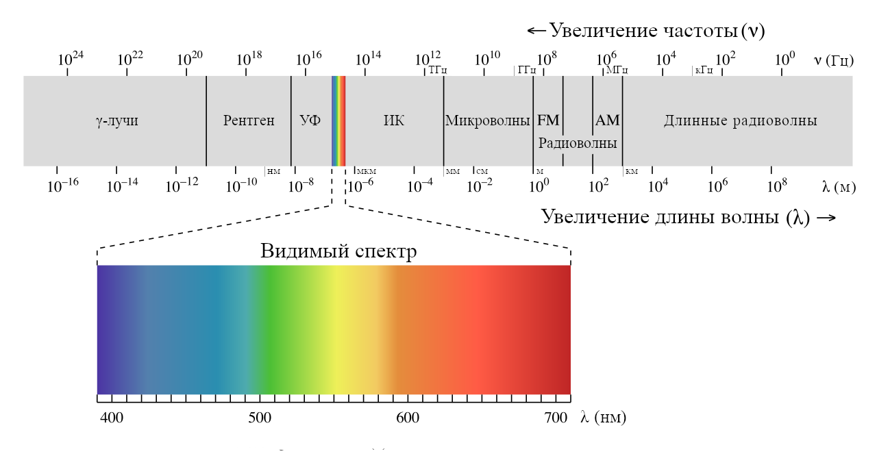 Электромагнитный спектр